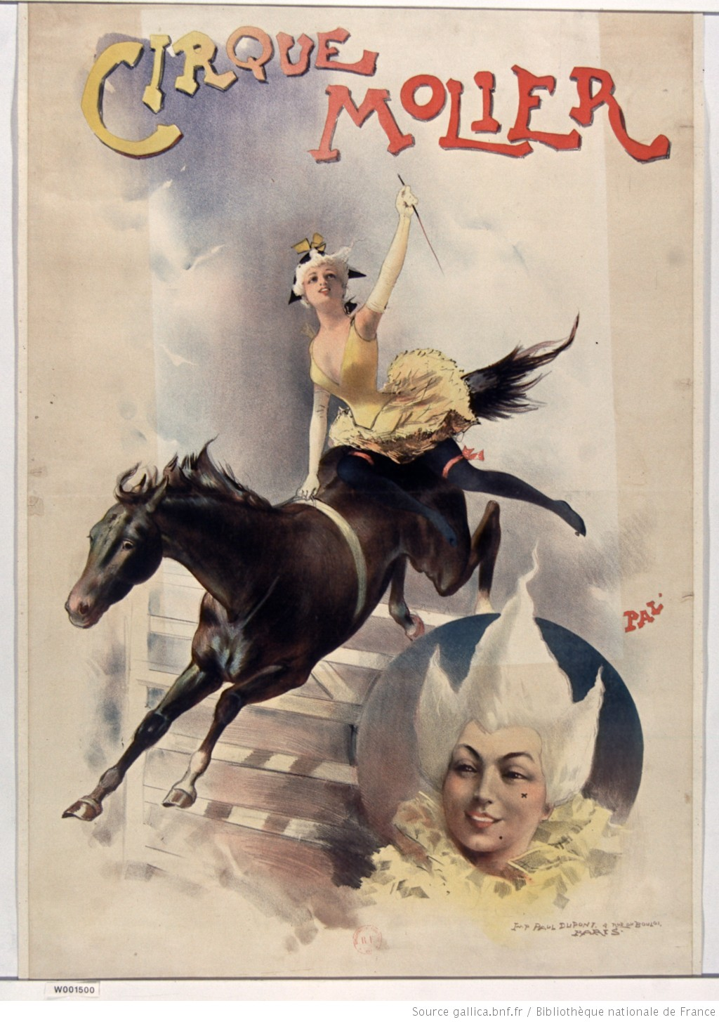 Affiche du cirque Molier (Source : ).